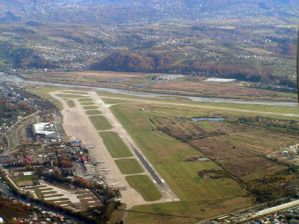 Аэропорт «Адлер» в октябре 2006 года. Снято с взлетающего Ту-134.